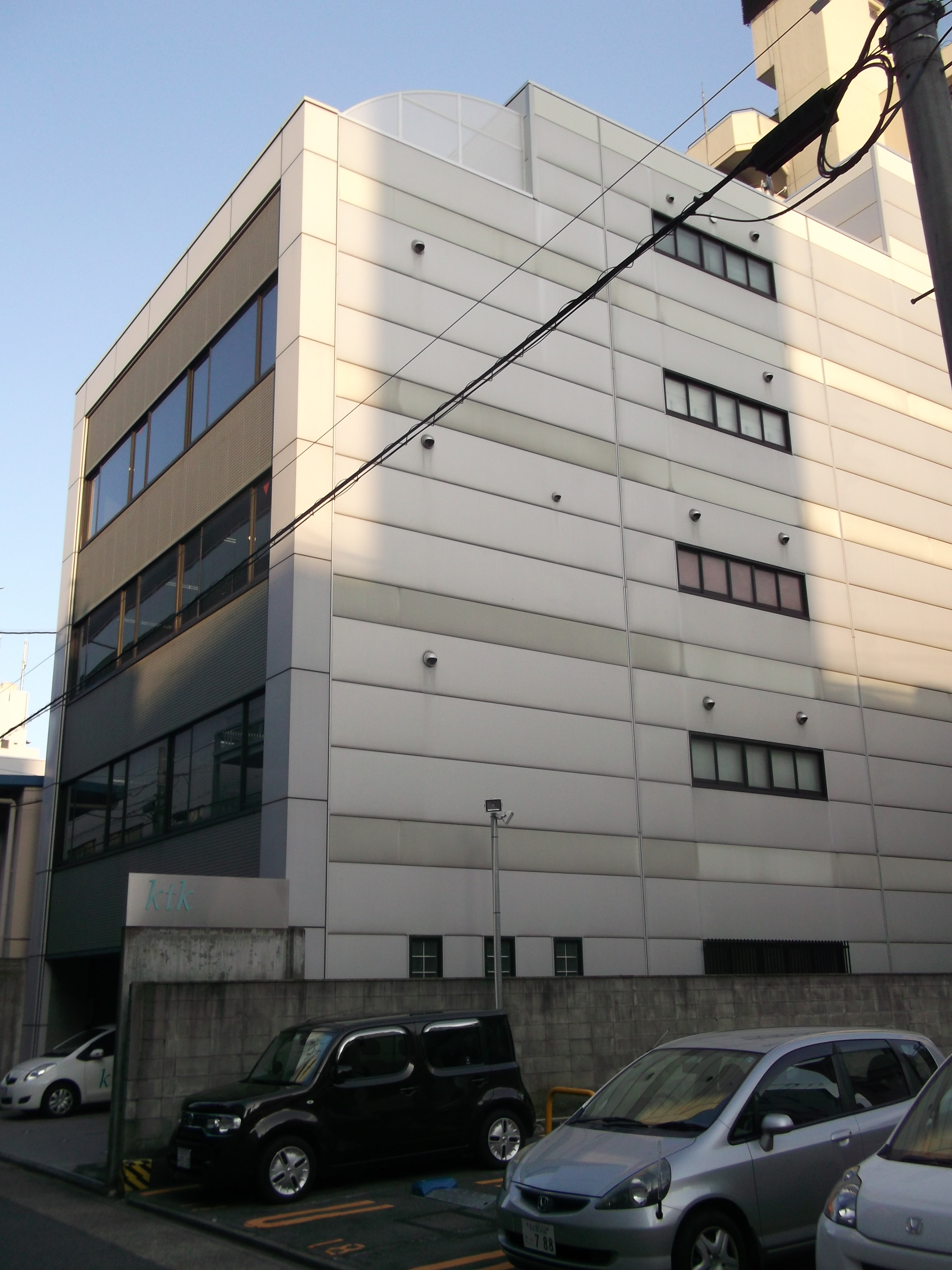 名古屋市東区のktk本社を北側公道西側より撮影